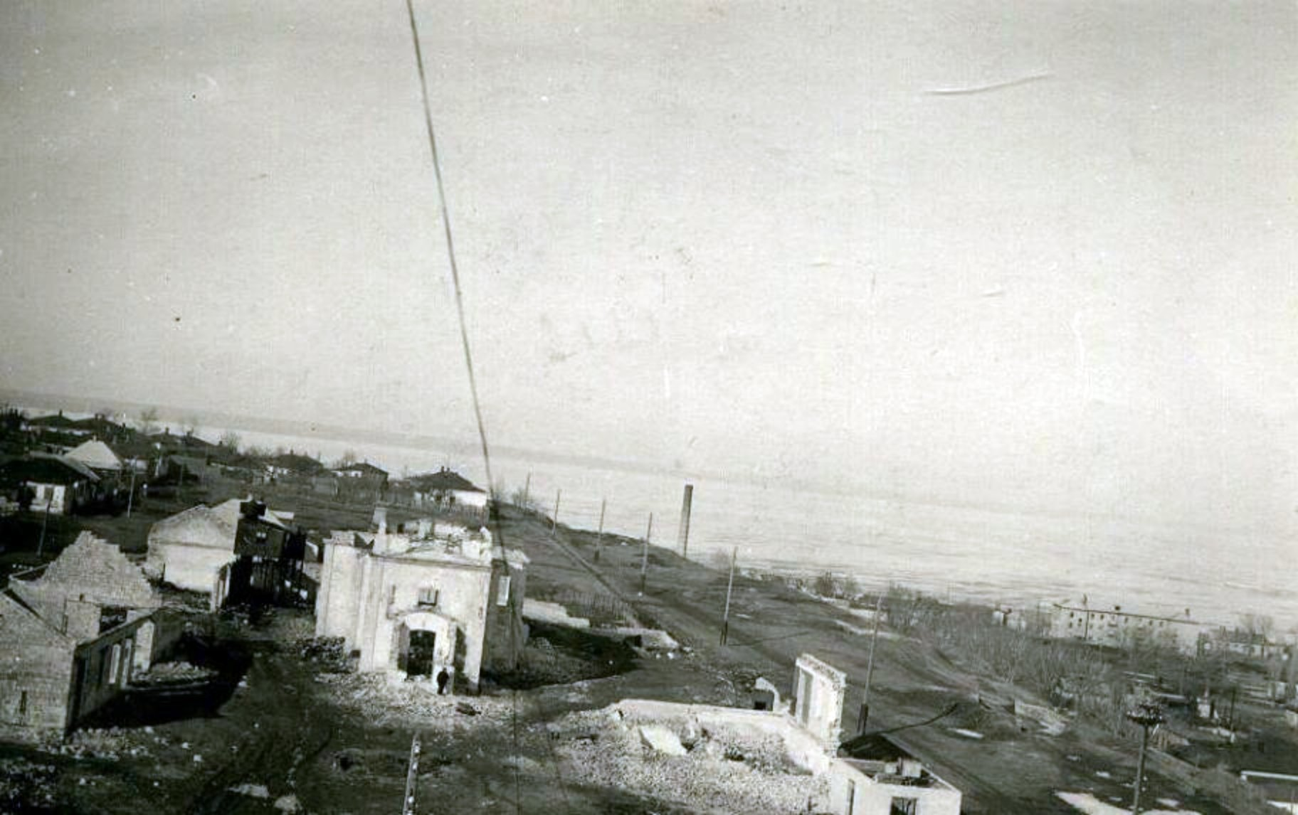 Вид на руины Троицкой церкови с маяка, Таганрог, апрель 1943. В отдалении виден памятник Петру I.